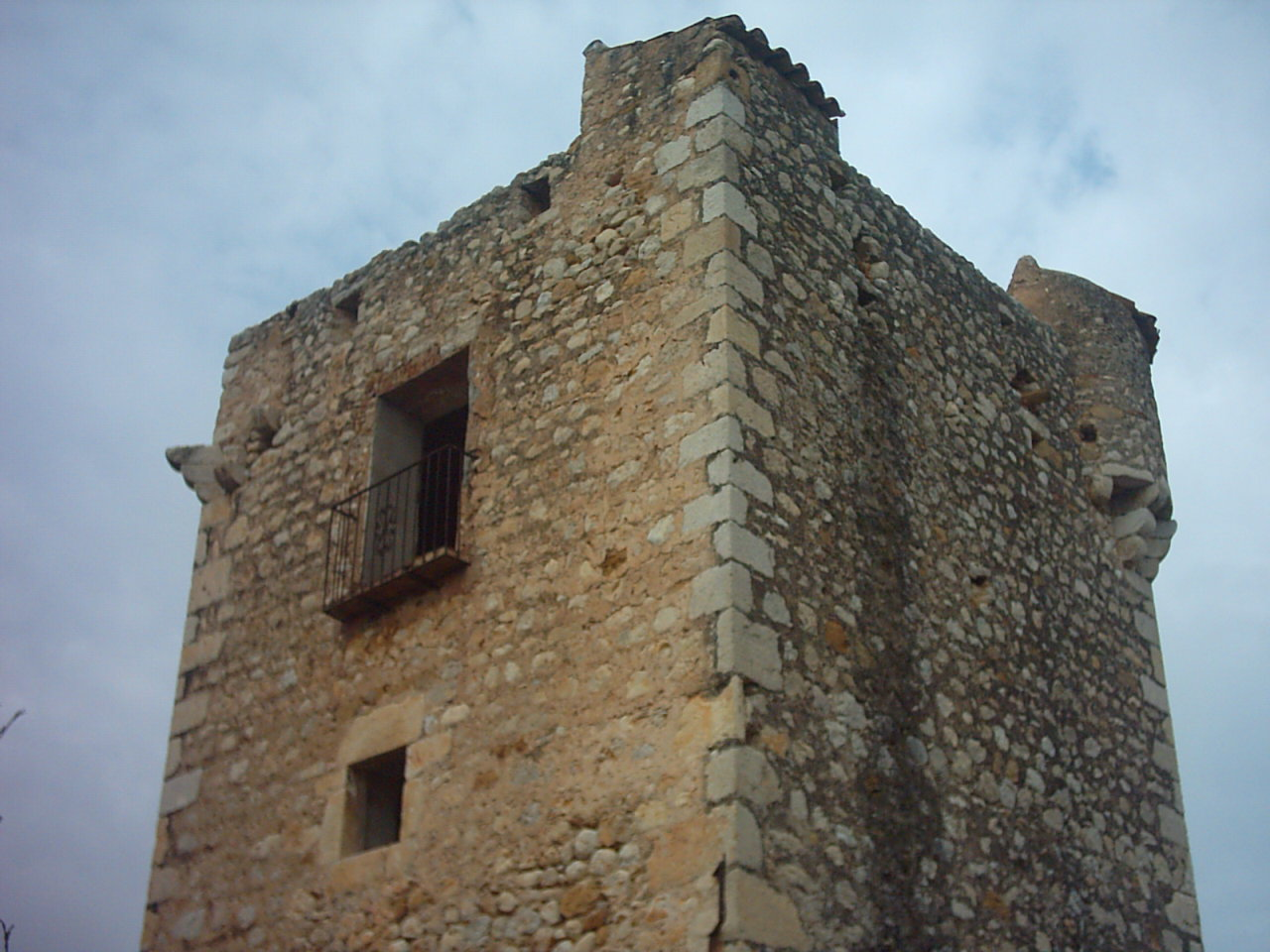 Torre del Carme (Cabanes)